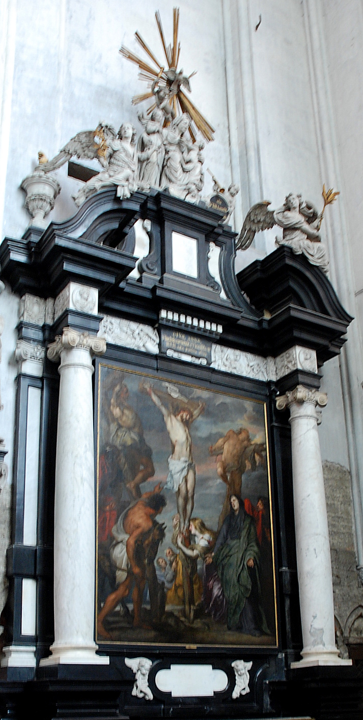 Schilderij van Antoon van Dyck Christus aan het kruis (1630) in de Sint-Romboutskathedraal in Mechelen, België